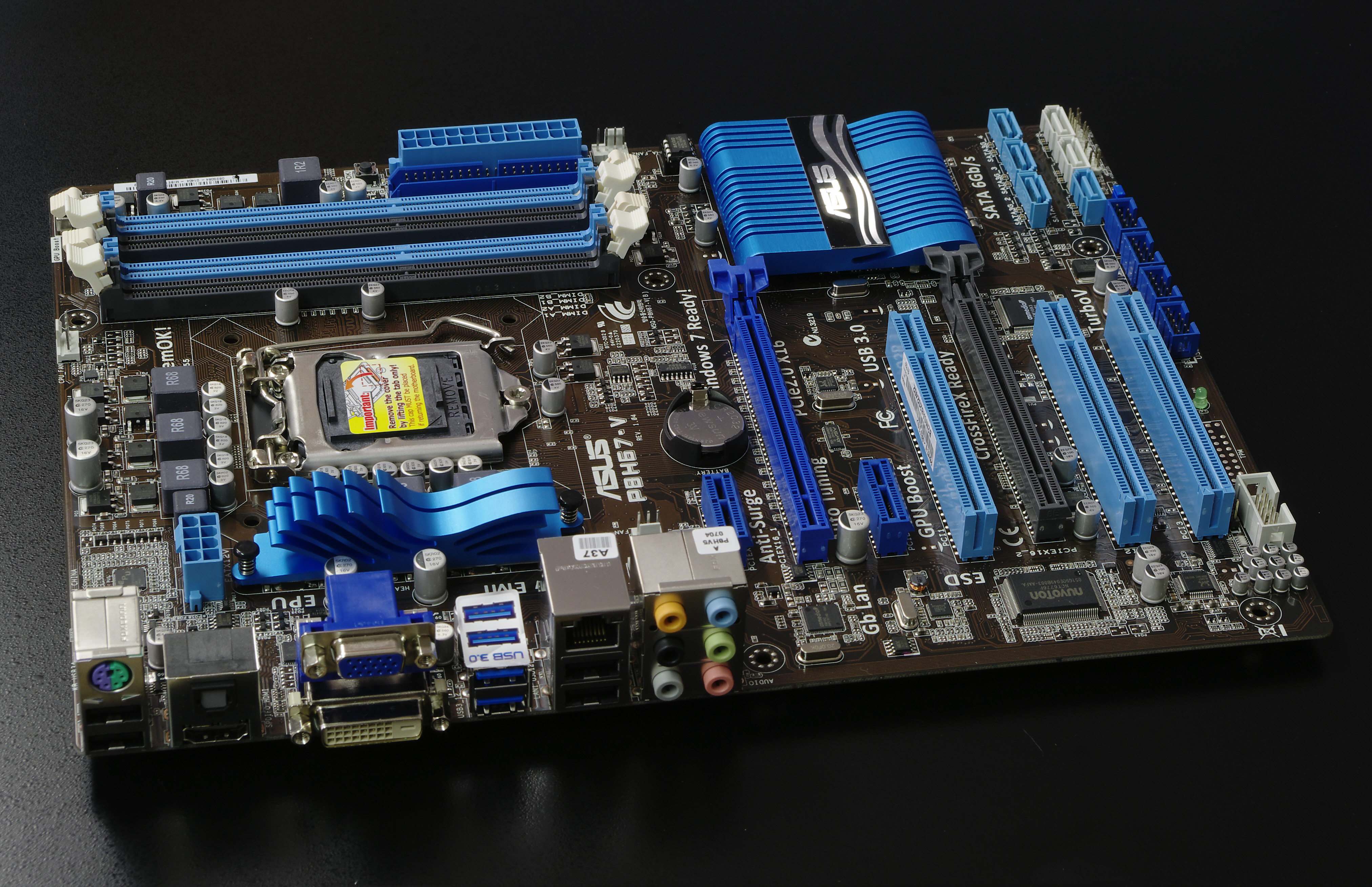 Mainboard Asus, Socket 1155, "Sandy Bridge"